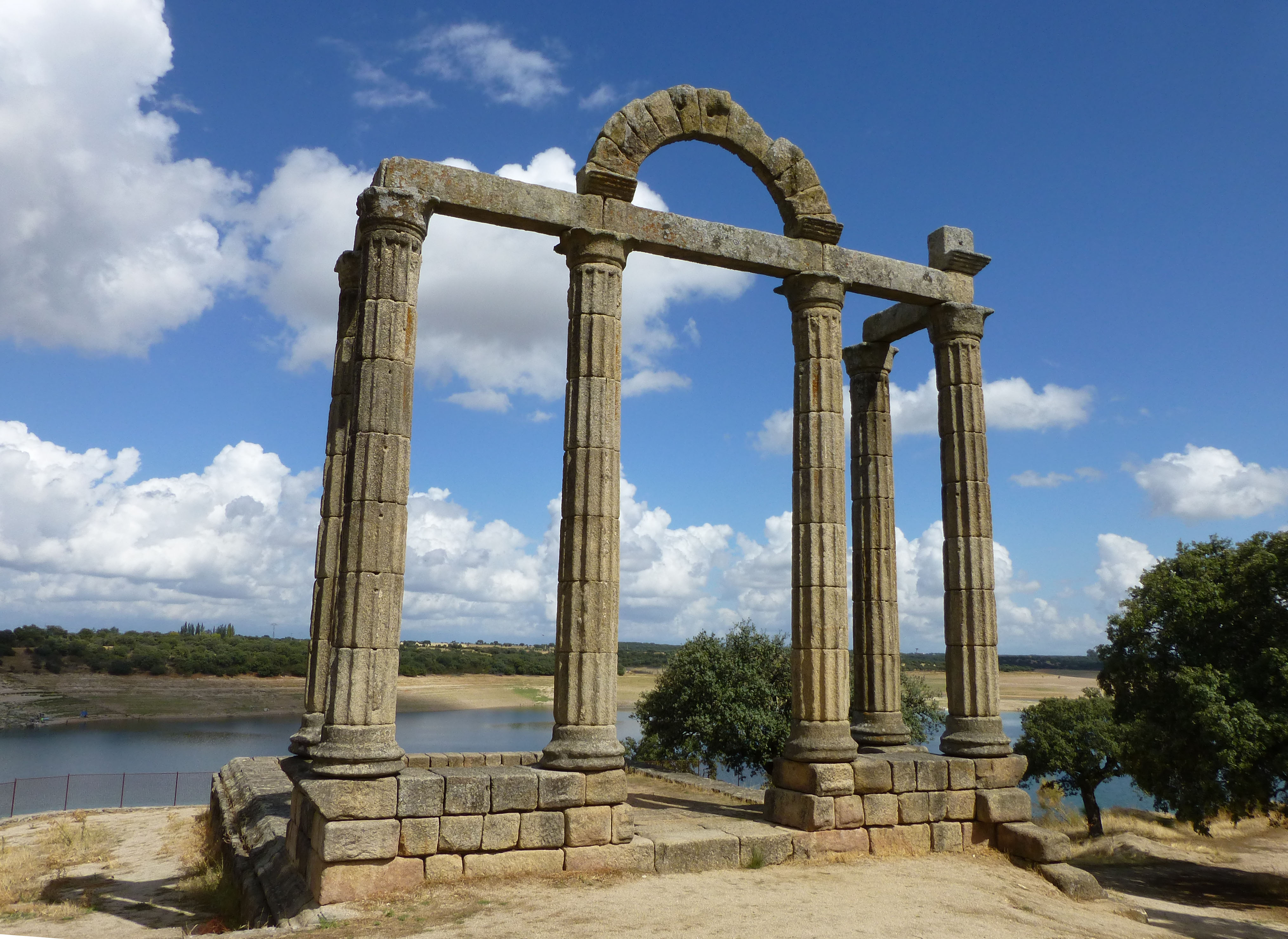 Ruinas Romanas de Talavera la Vieja